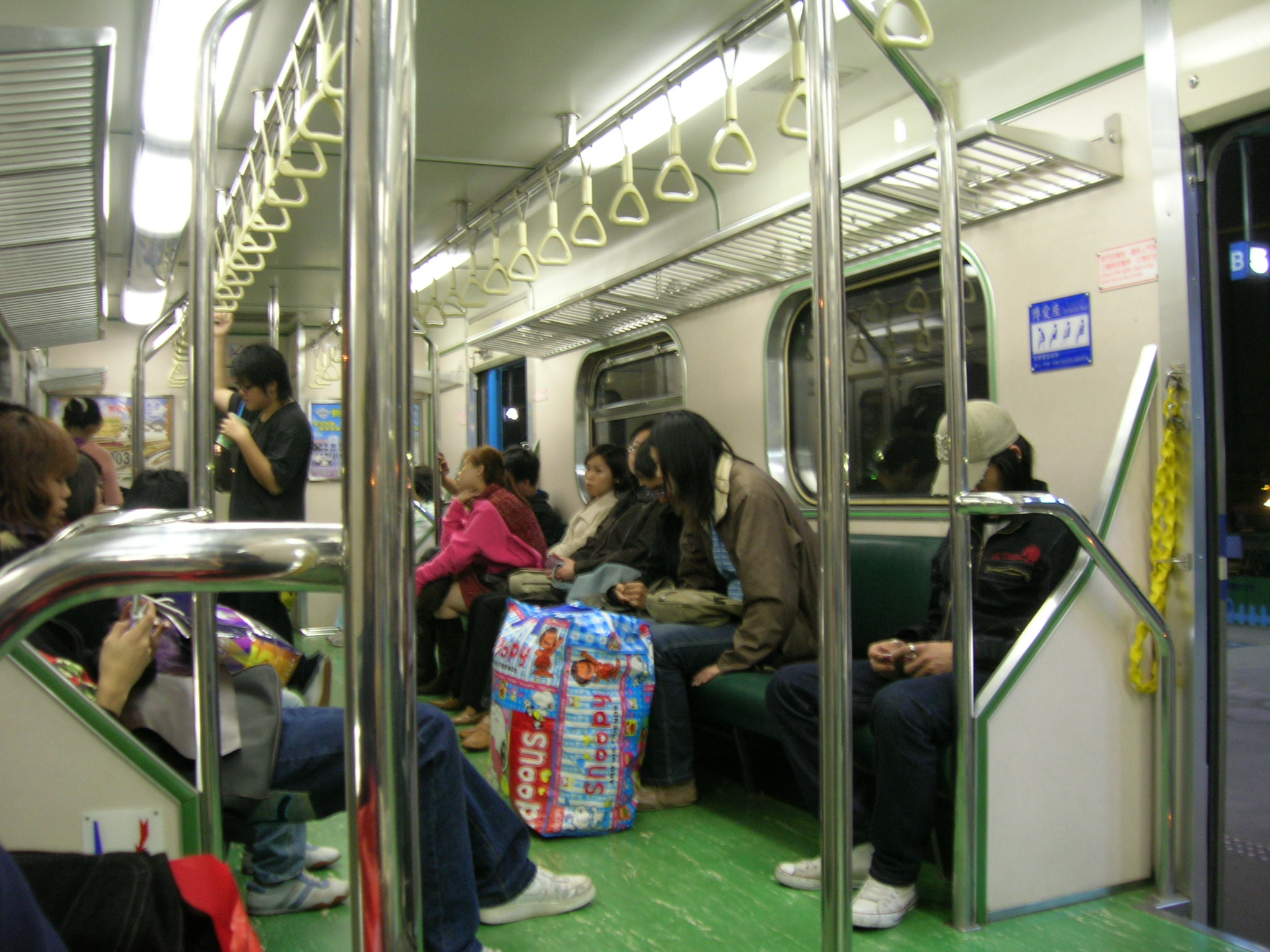 中文（台灣）: 臺灣鐵路管理局EMU500型電聯車內裝。